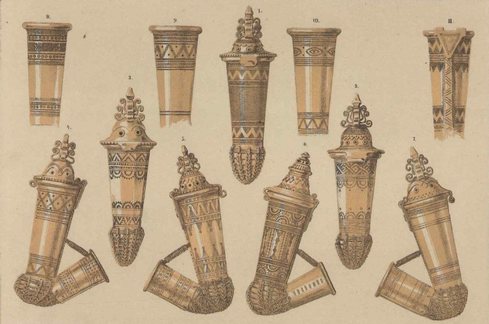 Сторінка з видання "Взори промислу домашнього. Металеві вироби селян на Русі" Табл. VIII 1-11 - люльки